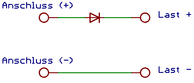 Verpolungsschutz mit seriell geschalteter Diode